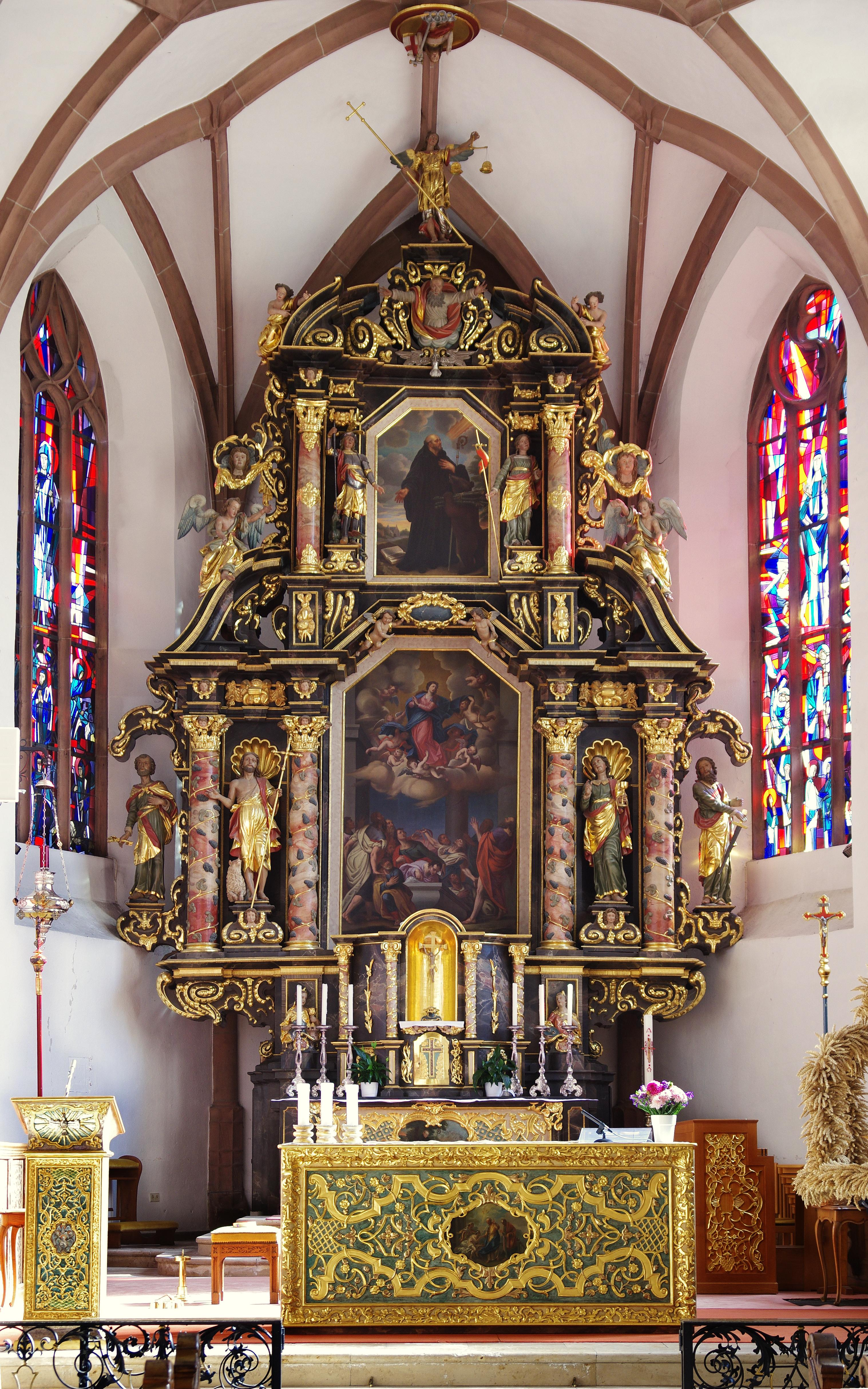 Der Hauptaltar